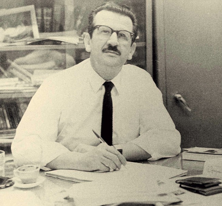 Ο συγγραφέας Γιάννης Μαρής